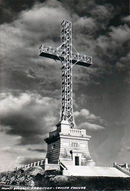 Crucea Eroilor de pe Muntele Caraiman - carte poștală